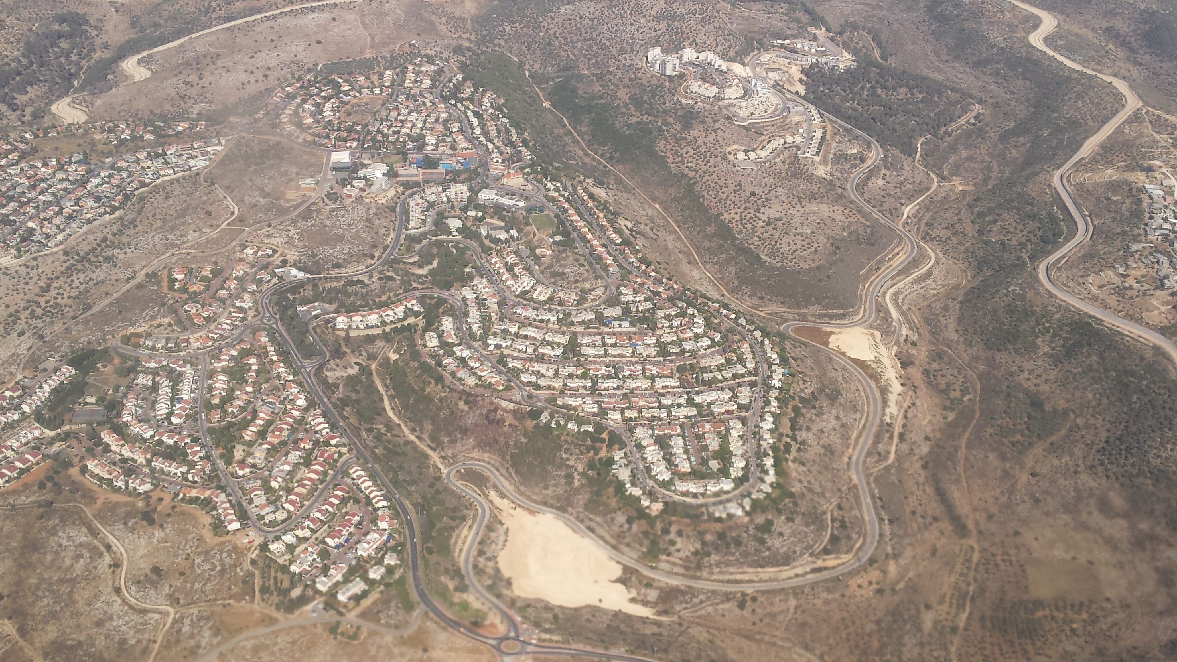 מבט מטיסה